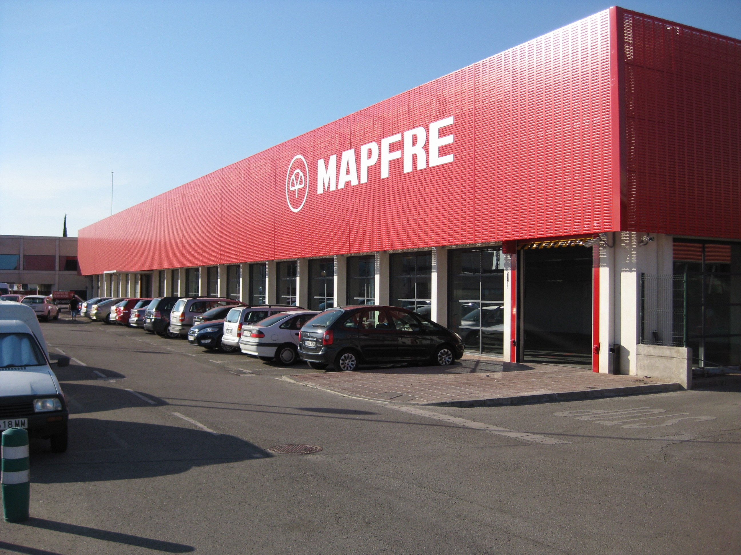 Mapfre Centro de Servicio de Alcalá de Henares